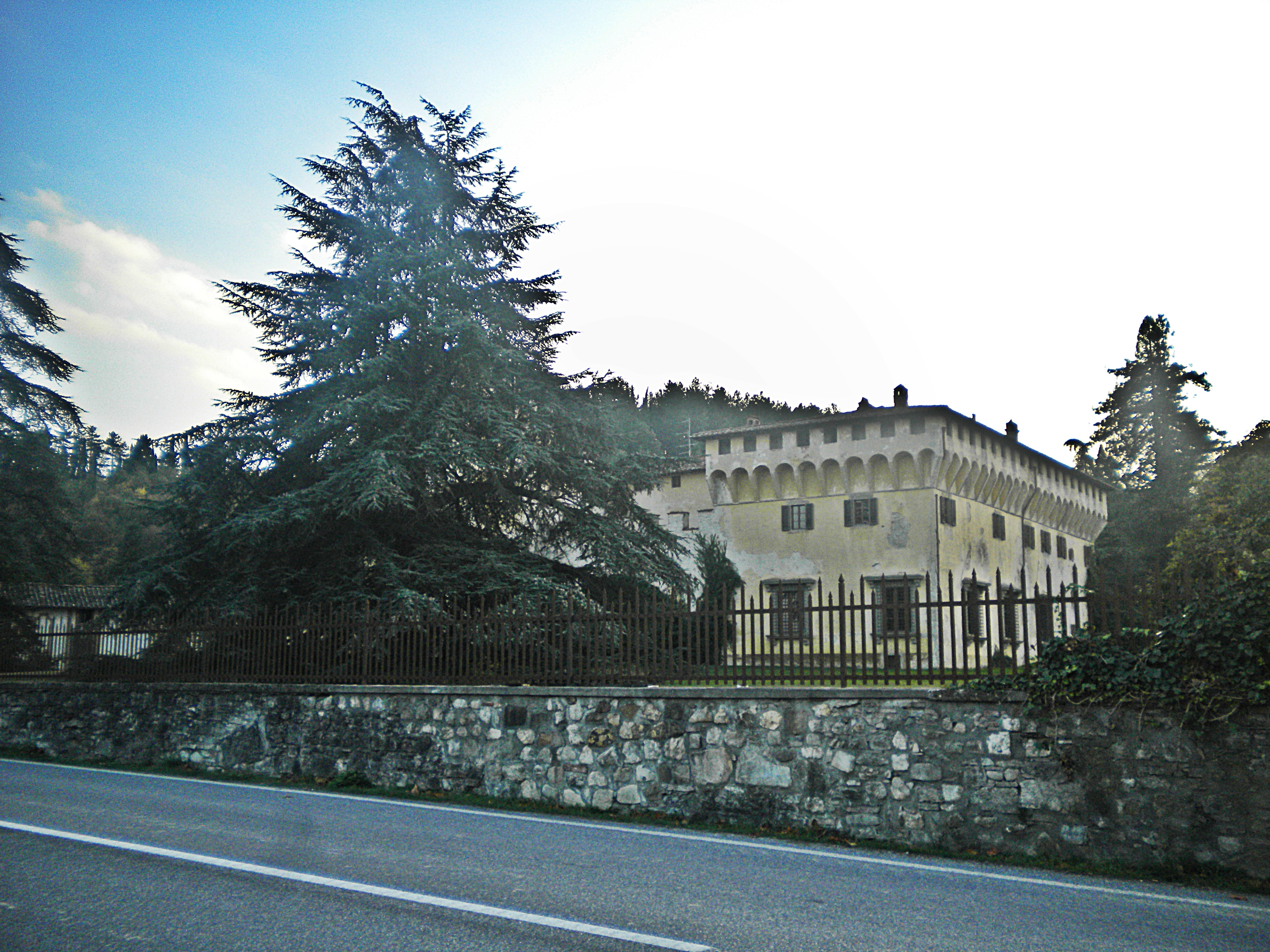 villa